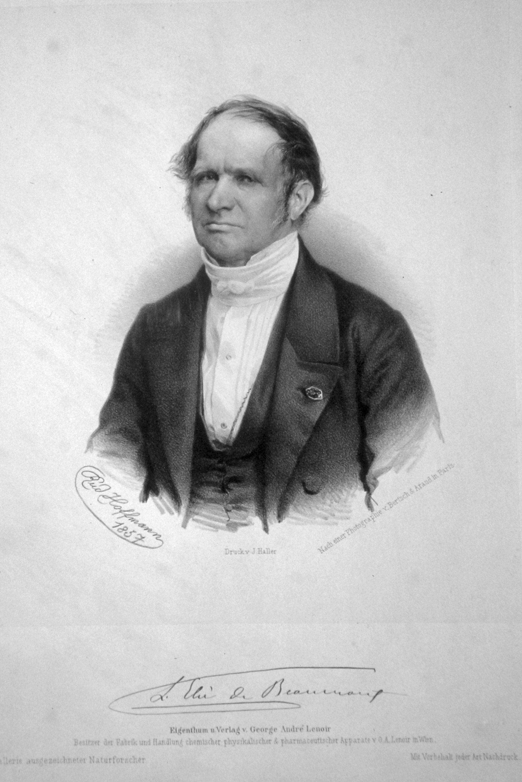 Léonce Élie de Beaumont (1798-1874), französischer Geologe. Lithographie von Rudolf Hoffmann, 1857.Nach einer Fotografie von Bertsch & Araud